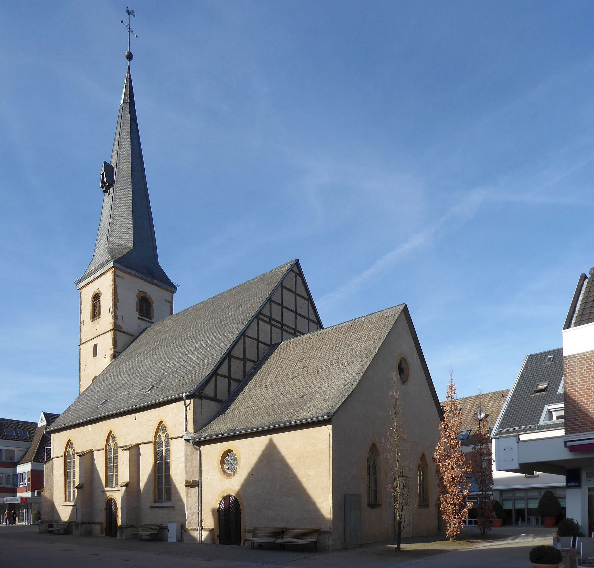 Evangelische Stadtkirche (Rheda)